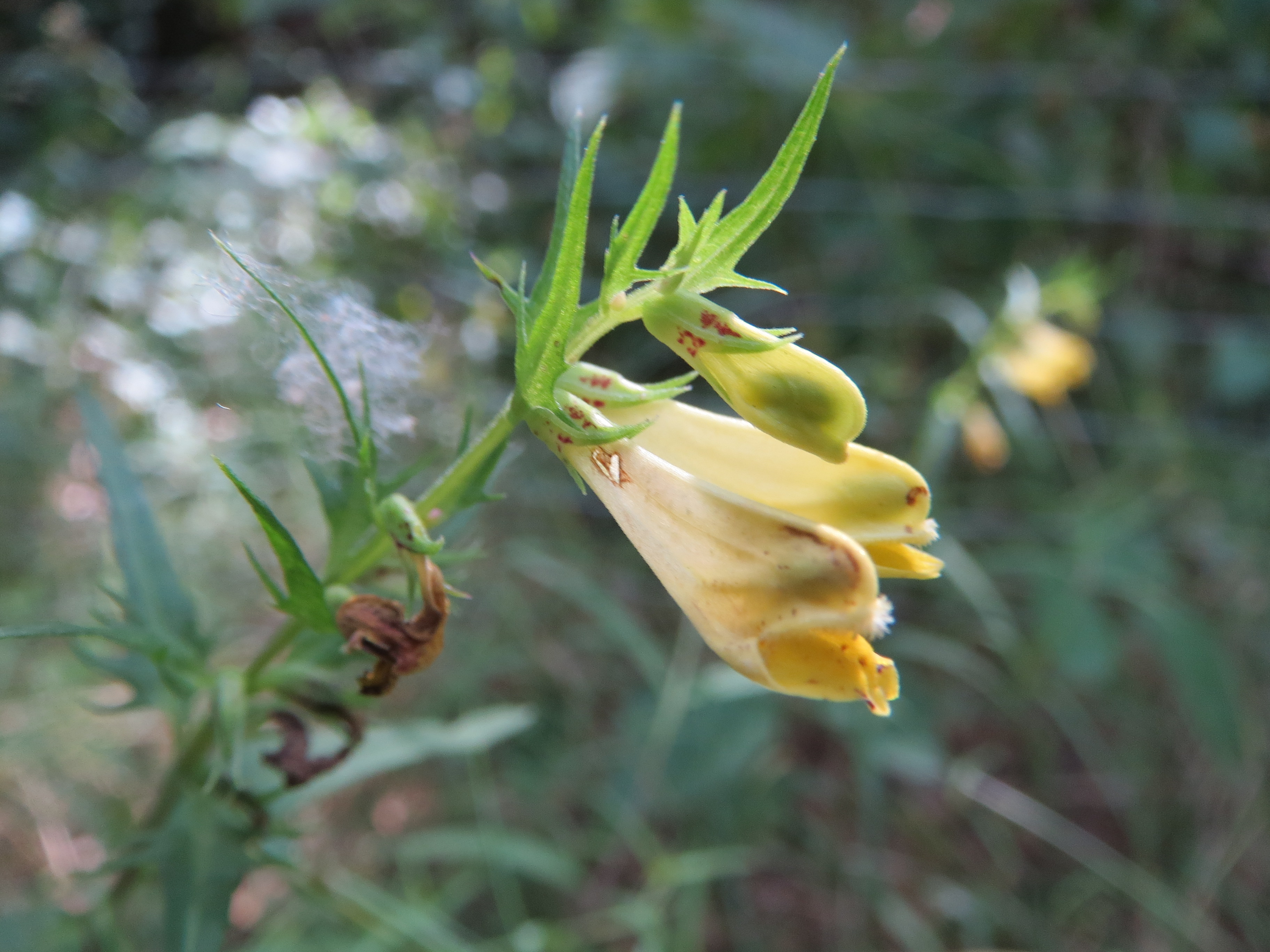 Wiesen-Wachtelweizen (Melampyrum pratense) im Waldschutzgebiet Bannwald Saubusch (Schwetzinger Hardt)